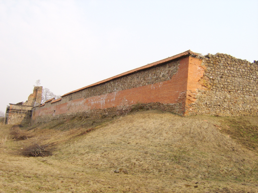 Medininkų pilis. Medininkai Castle, Lithuania